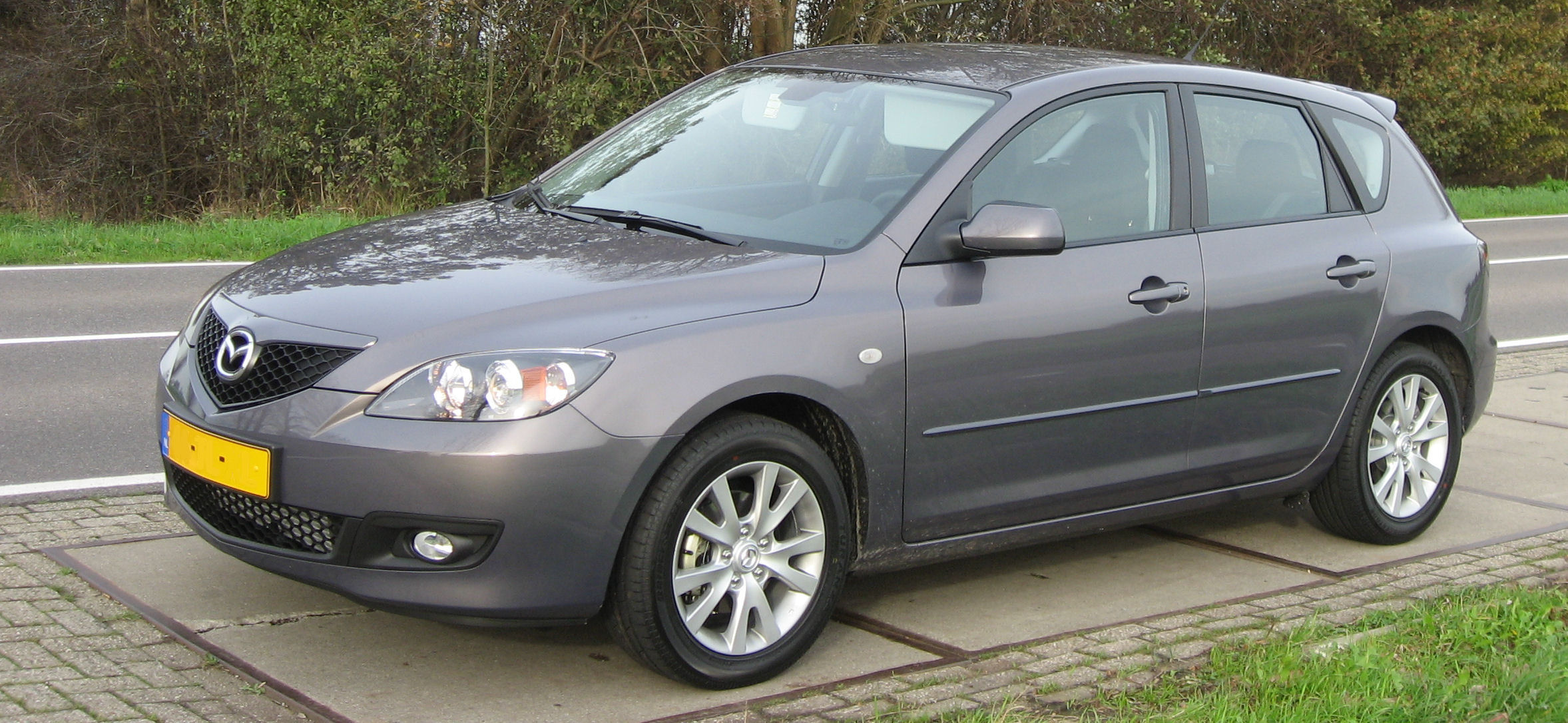 2007 Mazda 3 CiTD